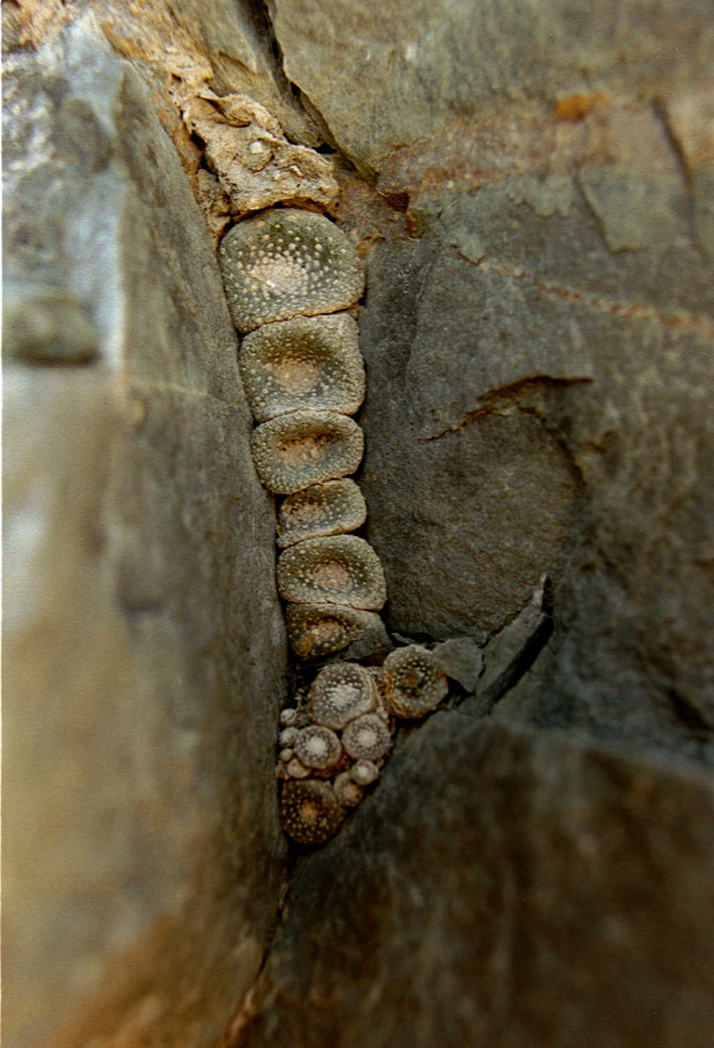 Blossfeldia liliputana in situ, Population Purmamarca, Salta, Argentinien